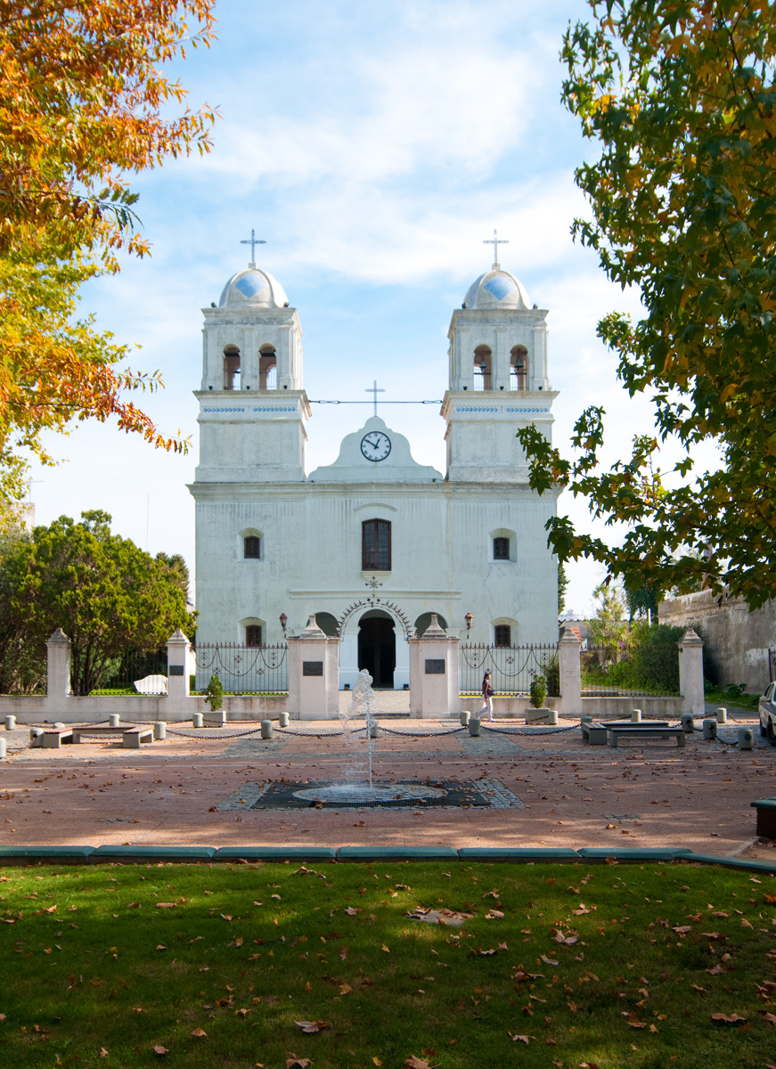 Iglesia de San Carlos. Ubicada en el departamento de Maldonado